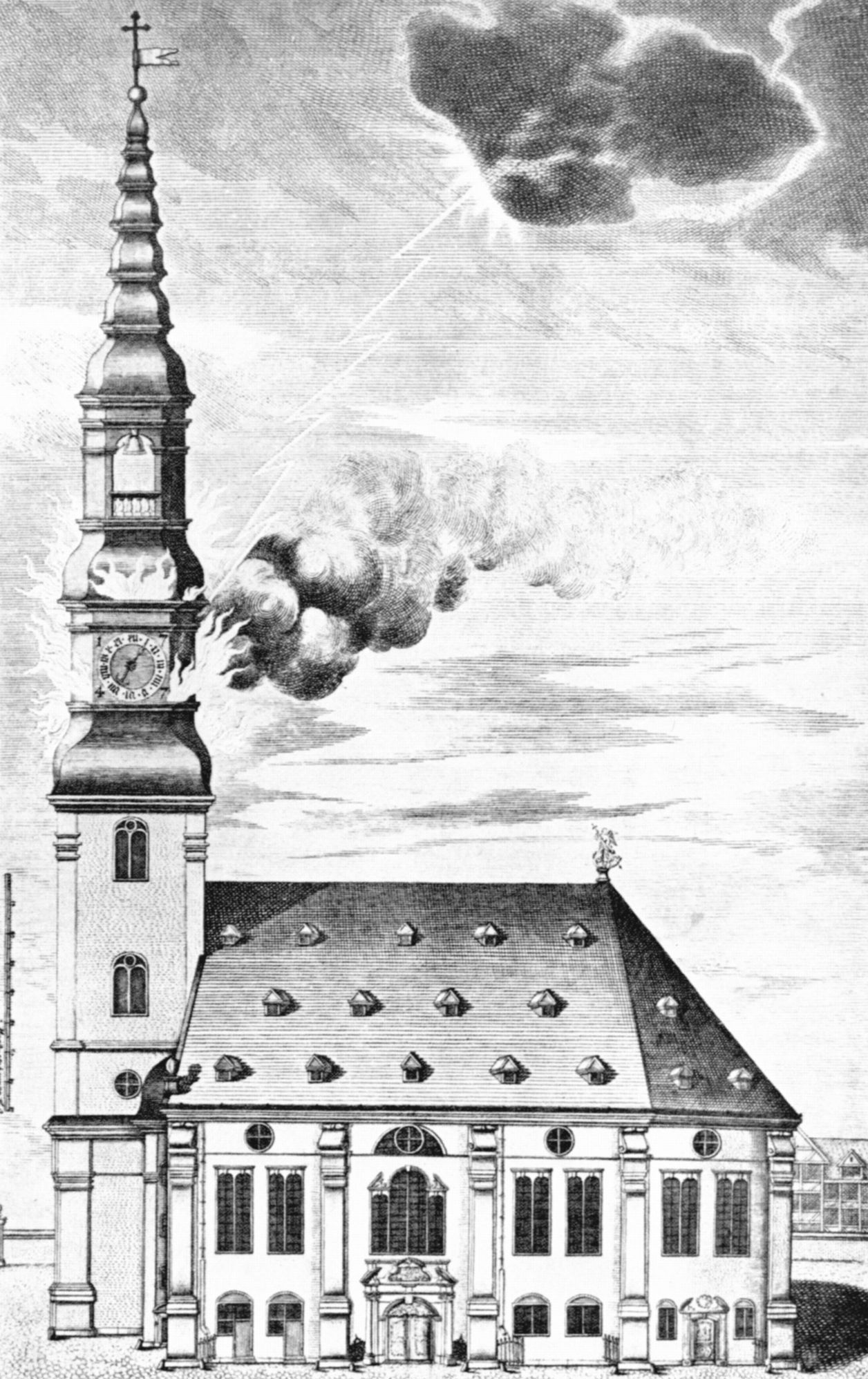 Franz Nikolaus Rolffsen: Kupferstich "Hamburg, Große Michaeliskirche mit einschlagendem Blitz" (1750)